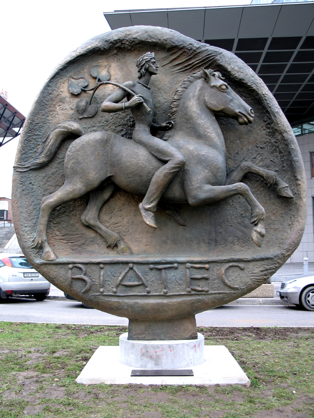 Bronzová plastika "Biatec" pred Národnou bankou Slovenskej republiky v Bratislave. Trojmetrový bronzový kruhový reliéf Biateca, keltského vládcu z 1. storočia pred Kristom bol inšpirovaný mincou. Od ruku 1990, bol v depozitári mestskej galérie v Bratislave. Plastika bola odhalená v novembri 2008.